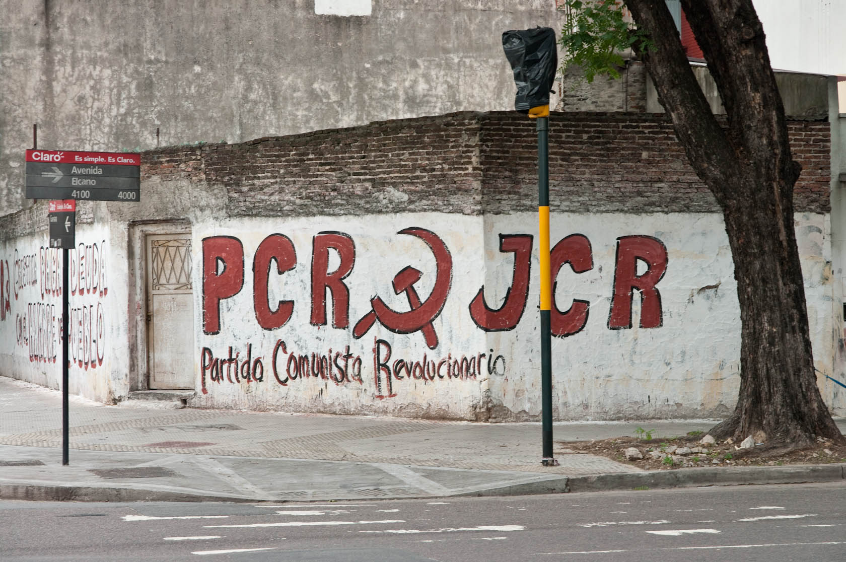 PCR mural